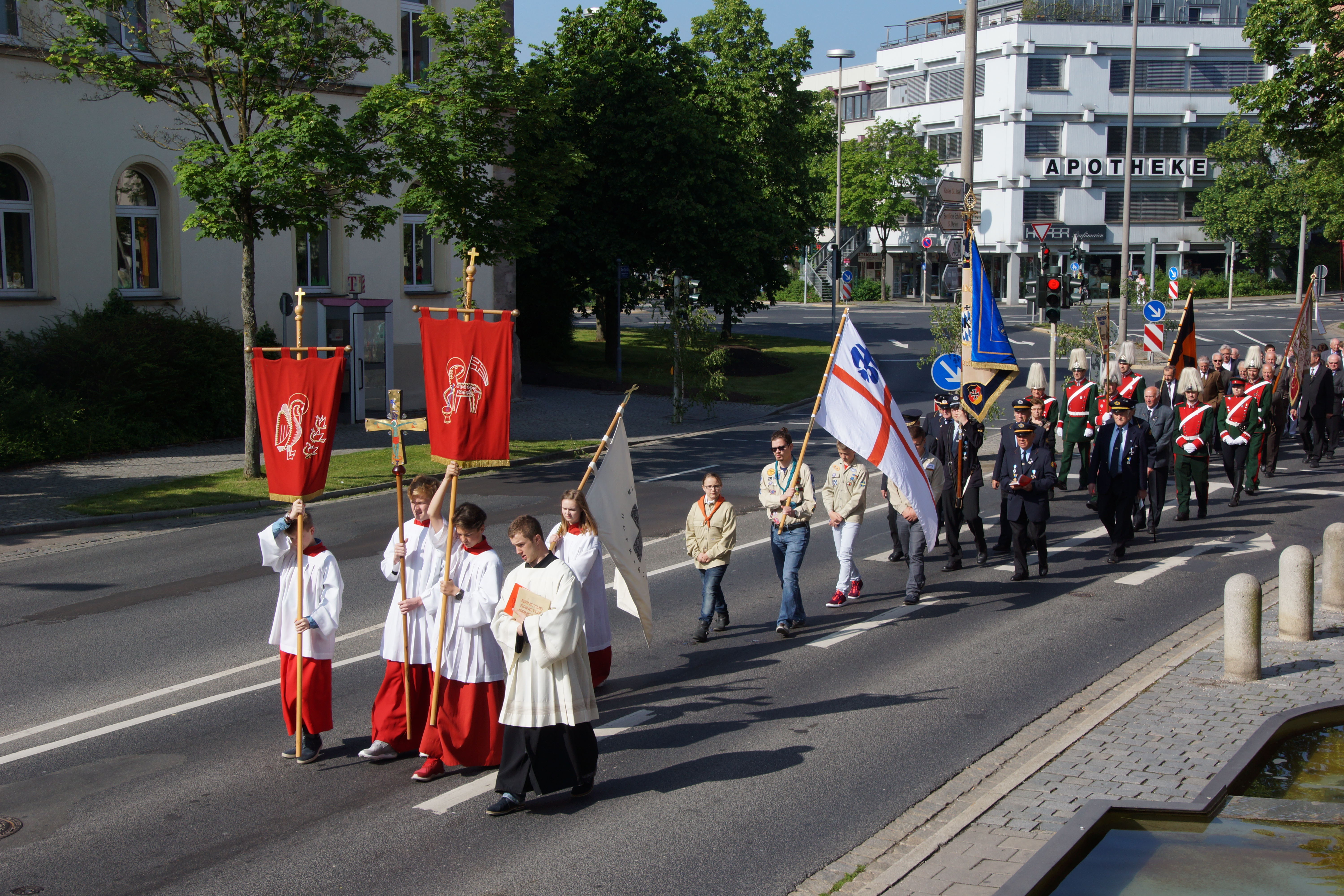 Die Fronleichnamsprozession im Mai 2016 in Neumarkt in der Oberpfalz